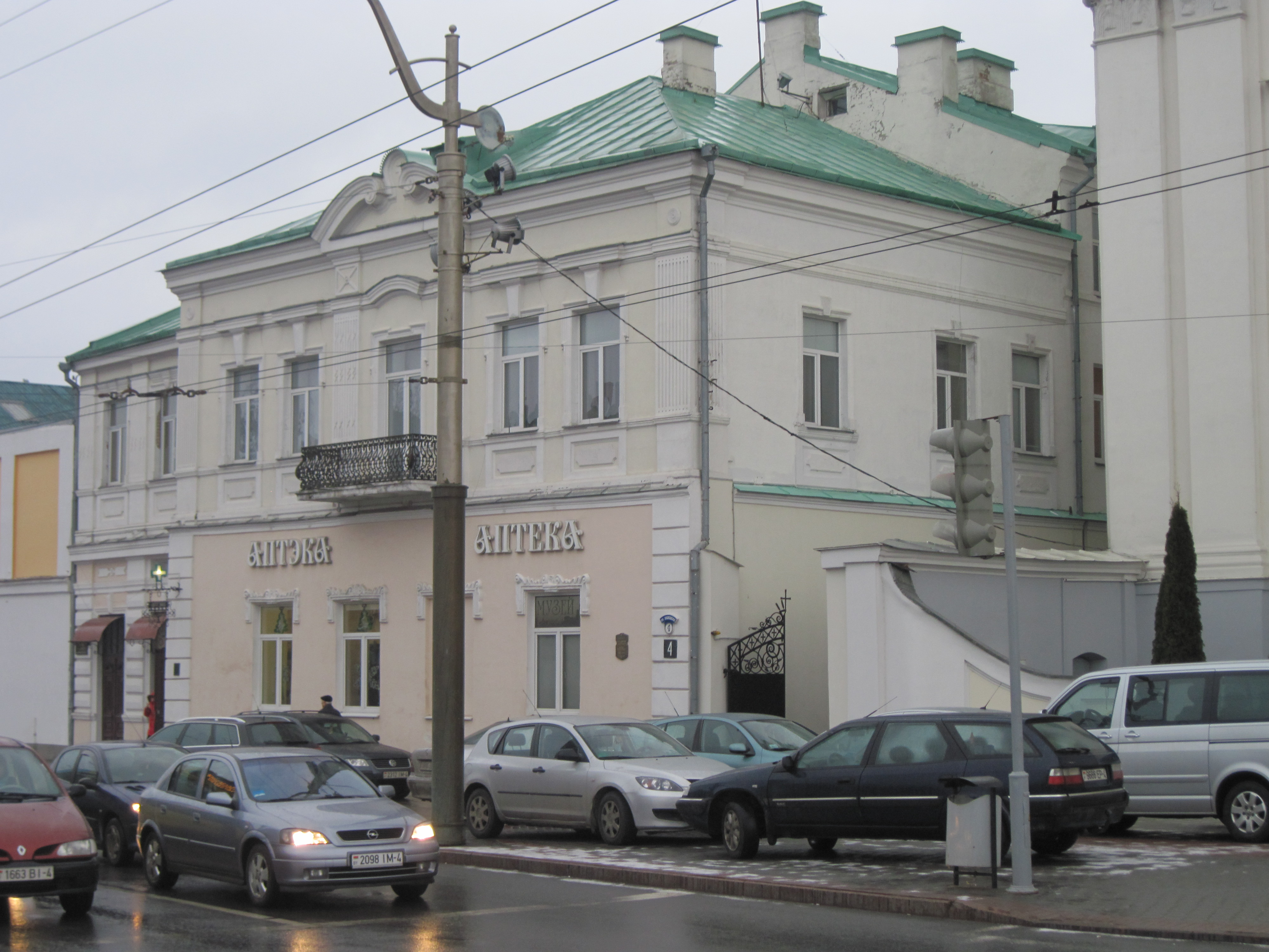 Беларуская (тарашкевіца): Аптэка па вул. Савецкая, 4, Гродна